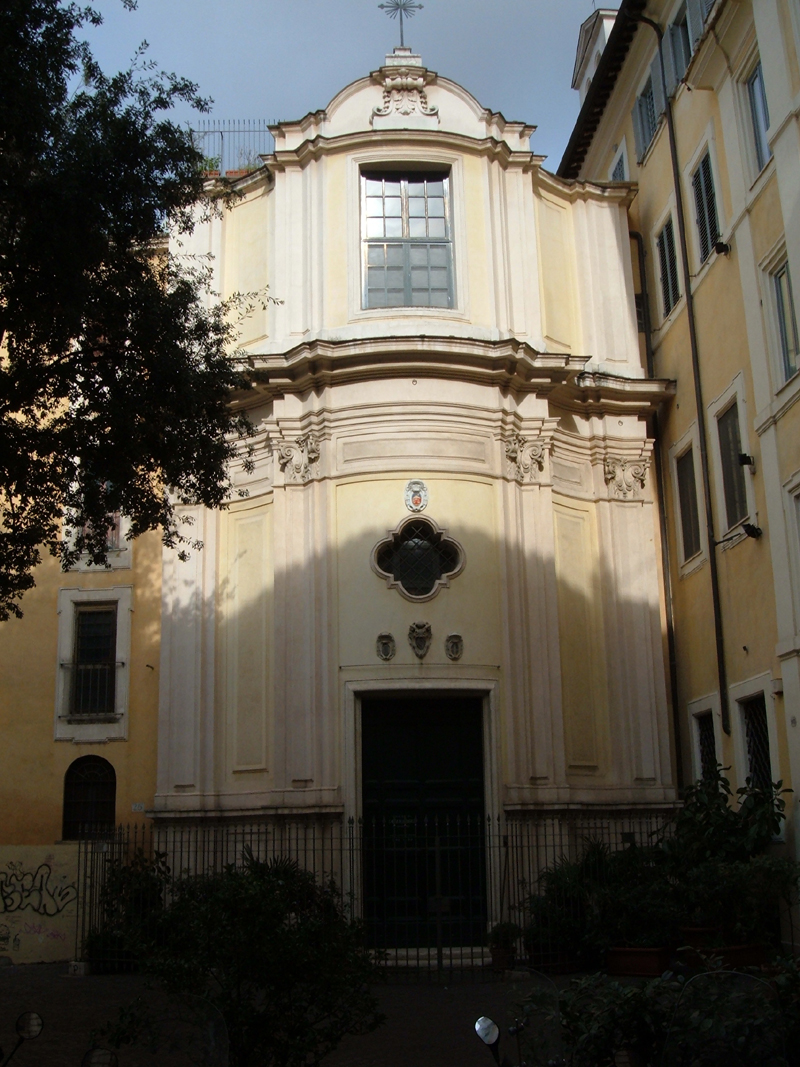 Chiesa di Santa Maria della Quercia, a Roma, nel rione Regola. Foto personale.